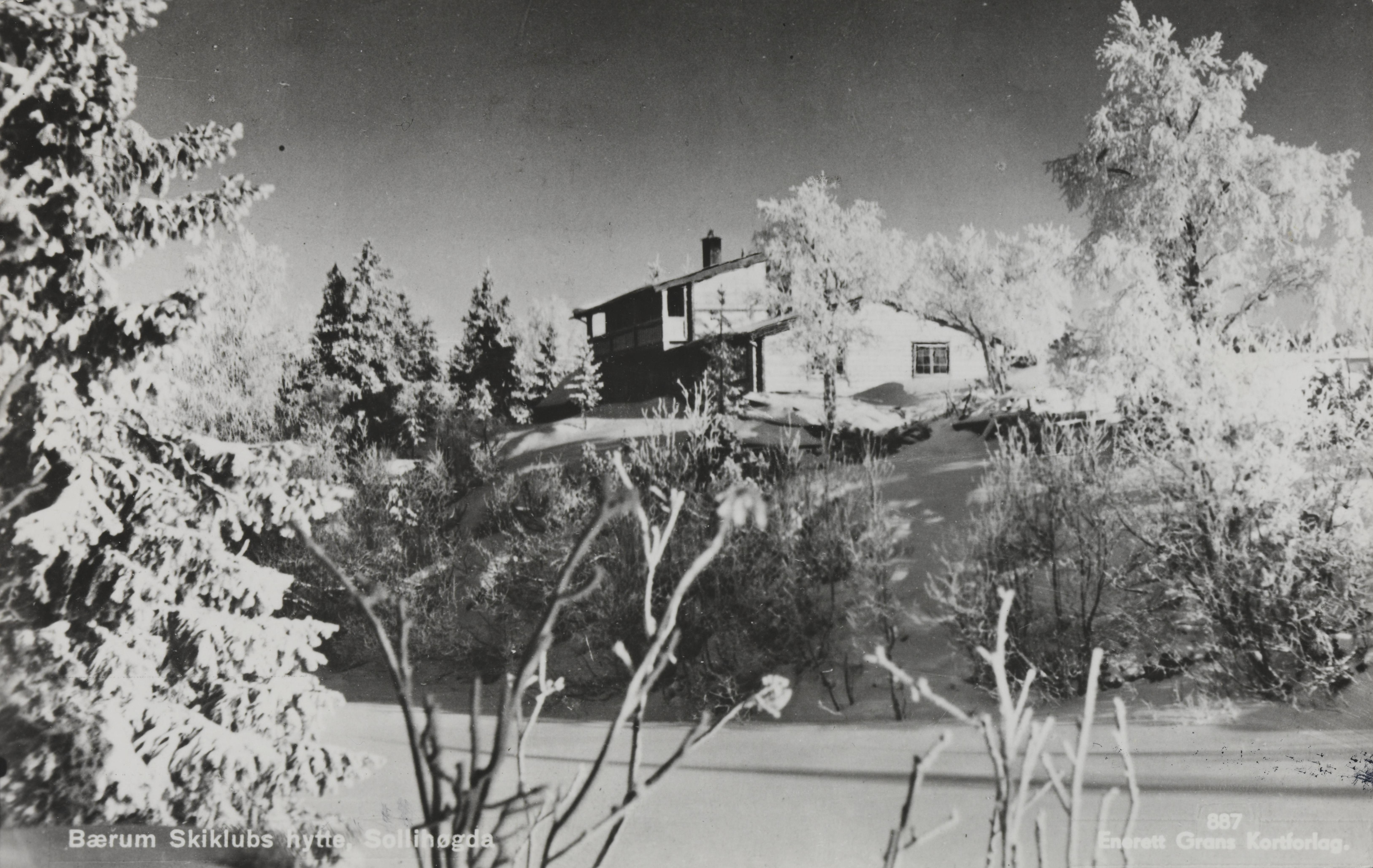 Bildet er hentet fra Nasjonalbibliotekets bildesamling Bærum,Sollihøgda, Bærum, Akershus